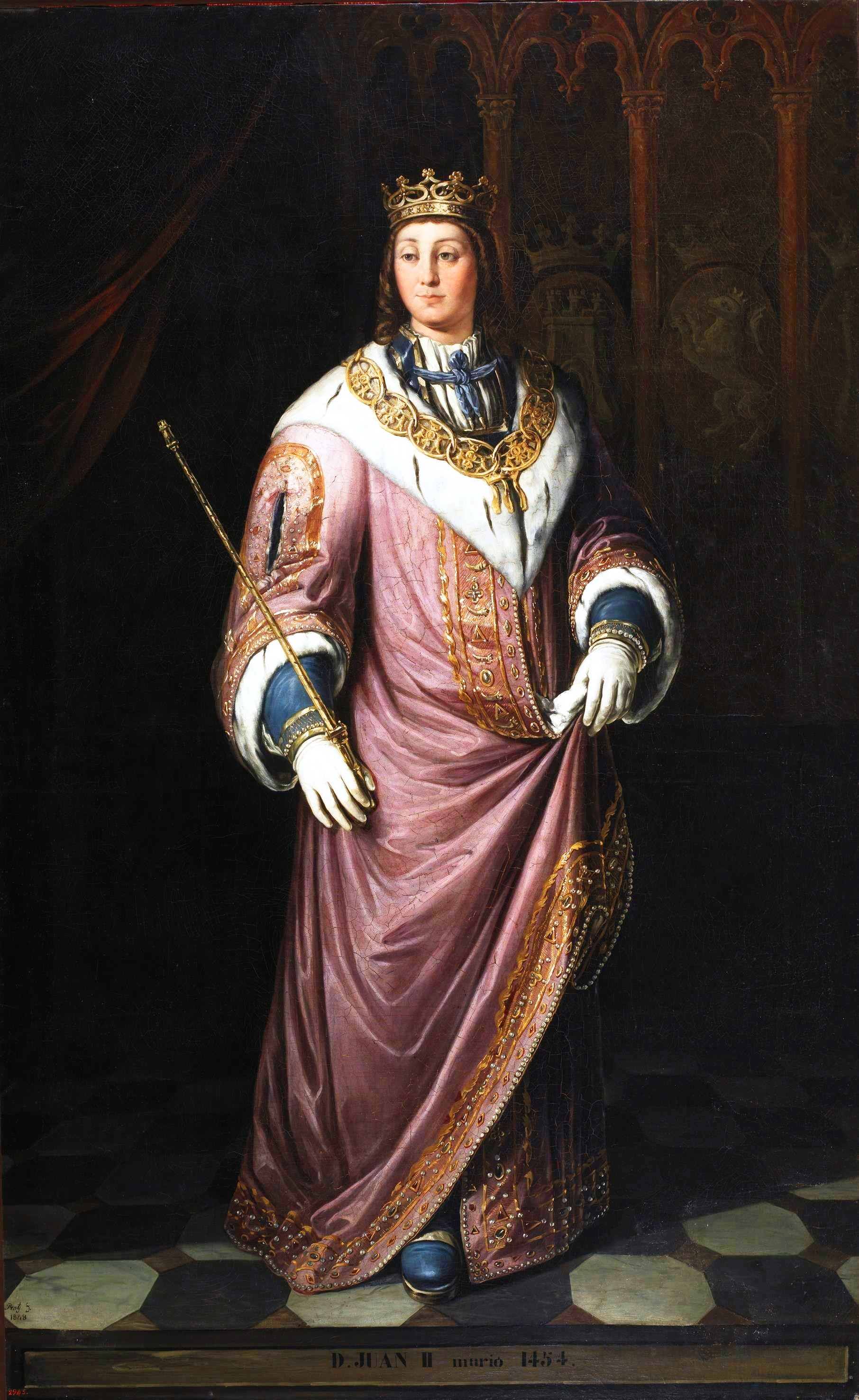 Retrato imaginario del rey Juan II de Castilla (1405-1454). Fue hijo del rey Enrique III de Castilla y de la reina Catalina de Lancáster. En 1431 el ejército castellano, comandado por el condestable Álvaro de Luna, derrotó a los musulmanes en la batalla de la Higueruela. En 1453 el condestable y valido Álvaro de Luna fue ejecutado por orden de Juan II en Valladolid. Y el rey Juan II falleció en Valladolid en 1454, a los 49 años de edad y fue sucedido en el trono por su hijo, Enrique IV de Castilla. Fue sepultado junto con su segunda esposa, la reina Isabel de Portugal, en la Cartuja de Miraflores.